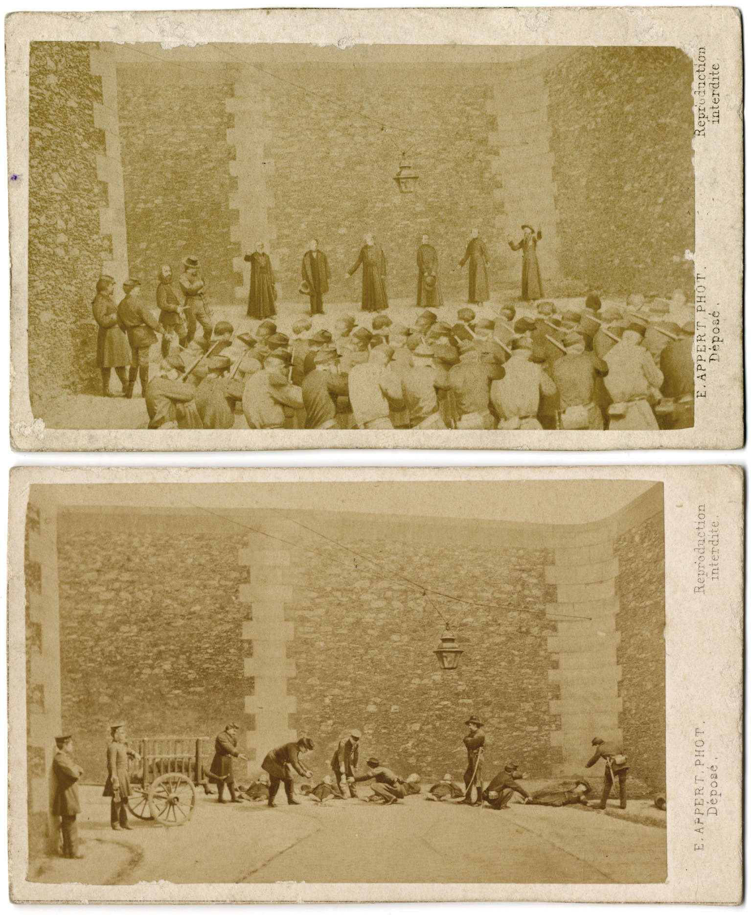 Dades tècniques: Fons: Municipal de Reus. Col·lecció d’imatges Títol: Crims de la Comuna: Assassinat d’ostatges a la presó de la Roquette, París, 1871 Autor: Eugène Appert (1830-1891) Suport: paper Tècnica: albúmina. Dimensions : 5,8 x 9,3 ; 5,8 x 9,3 cm. La col·lecció d’imatges del fons Municipal de Reus conserva dues fotografies del pintor i fotògraf francès Eugène Appert (1830-1891). L’any 1871 Eugène Appert va publicar "Els crims de la Comuna", una sèrie de nou fotografies amb escenes dels esdeveniments que van succeir amb la declaració de París com a Comuna independent, després de la derrota de França en la guerra francoprussiana i la caiguda de Napoleó III. Aquestes dues fotografies mostren l'execució d'ostatges de la Comuna de París a les muralles de la presó de la Gran Roquette, el dia 24 de maig de 1871. Les imatges, però, són un fotomuntatge que recreen els fets amb l’ajut d’un gran nombre d’actors que interpreten les escenes. Appert utilitzà la fotografia per demostrar les accions sanguinàries dels revoltats.